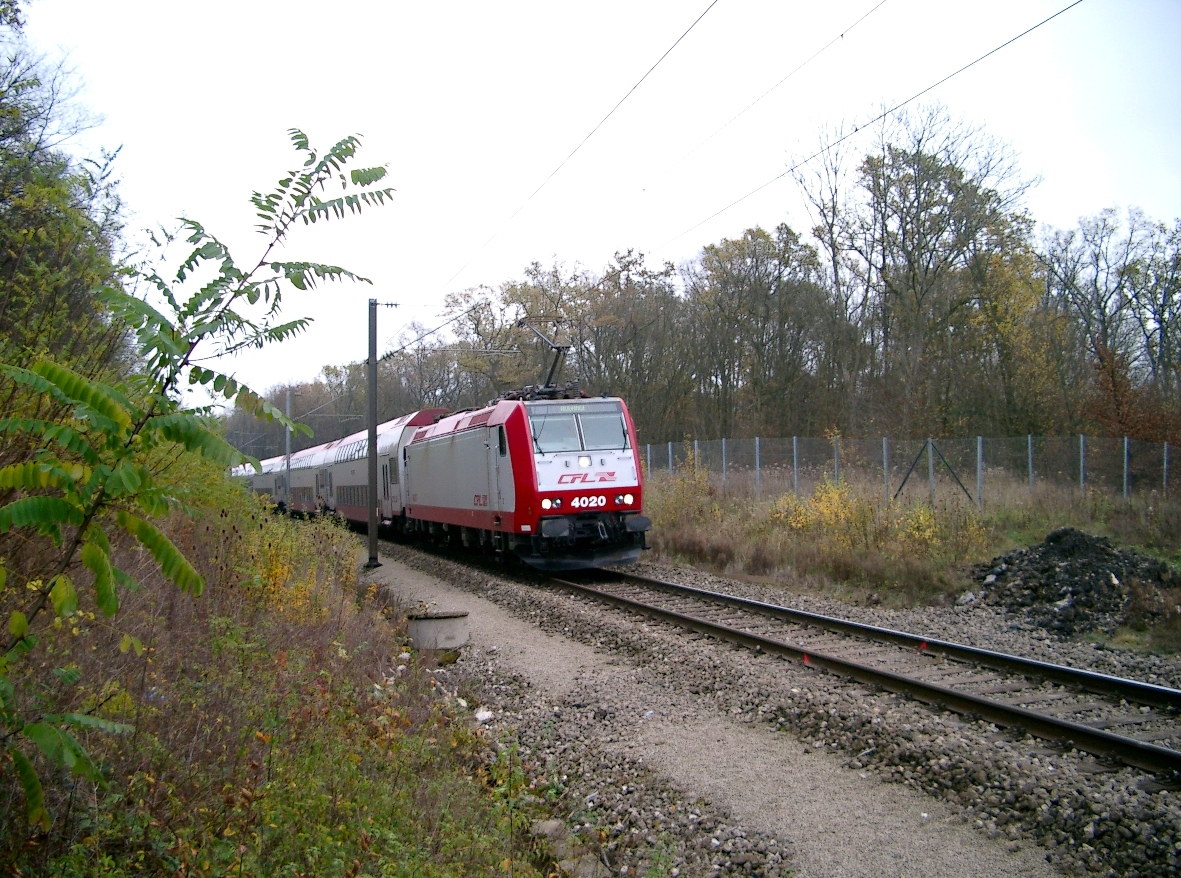 Sujet:Zuch op der Streck Péiteng - Lëtzebuerg. Kategorie:Eisebunnsstrecken zu Lëtzebuerg